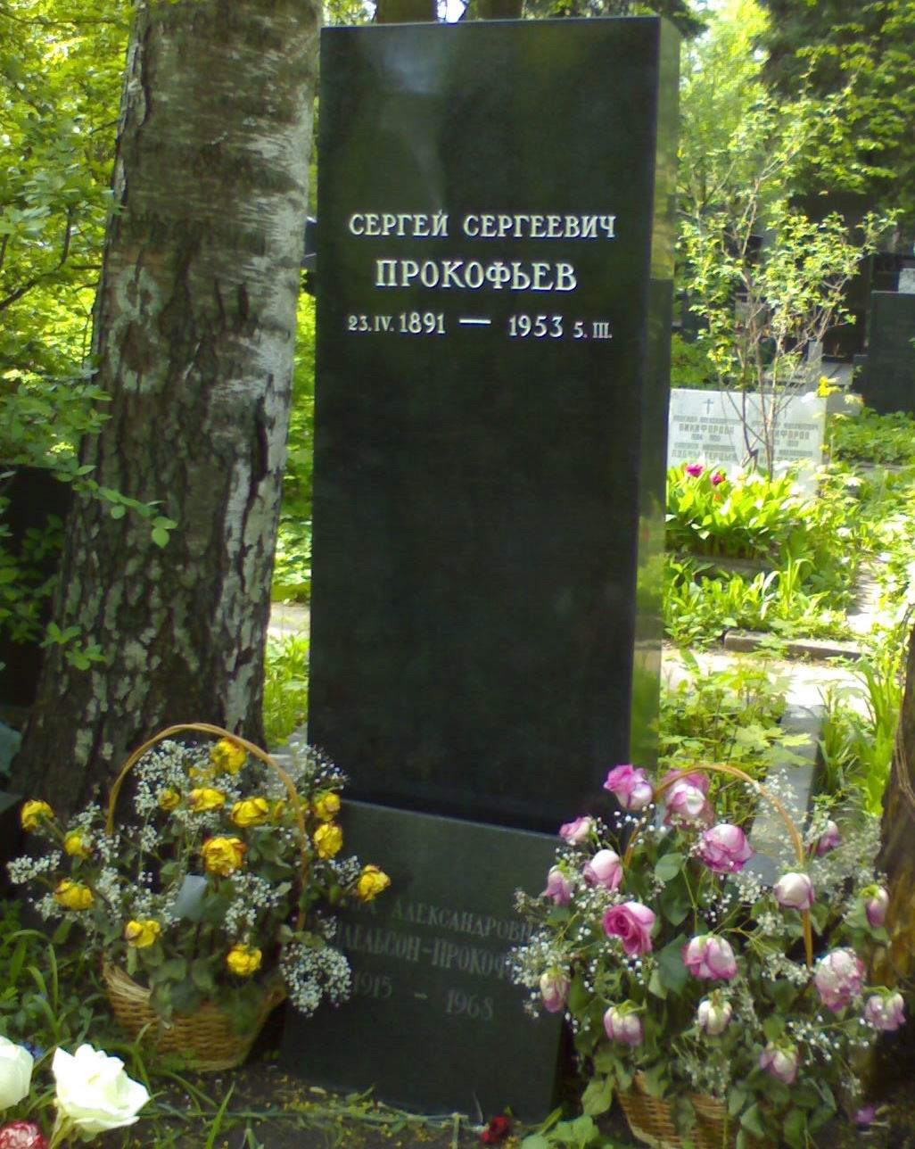 Памятник Сергею Сергеевичу Прокофьеву на Новодевичьем кладбище, 3 уч.